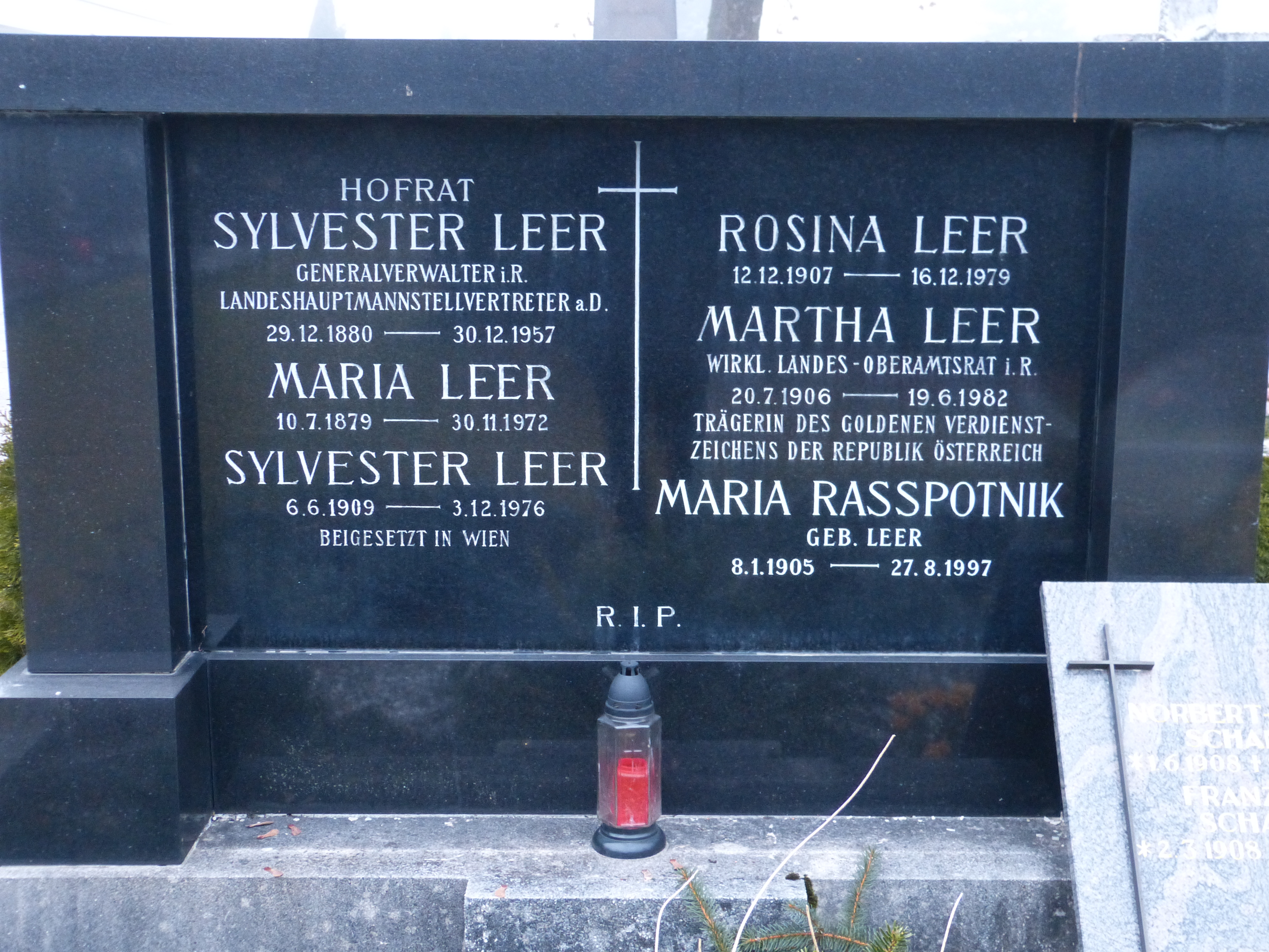 Grab am Friedhof Annabichl, Klagenfurt: Sylvester Leer (1880-1957; Politiker) Martha Leer (1906-1982).